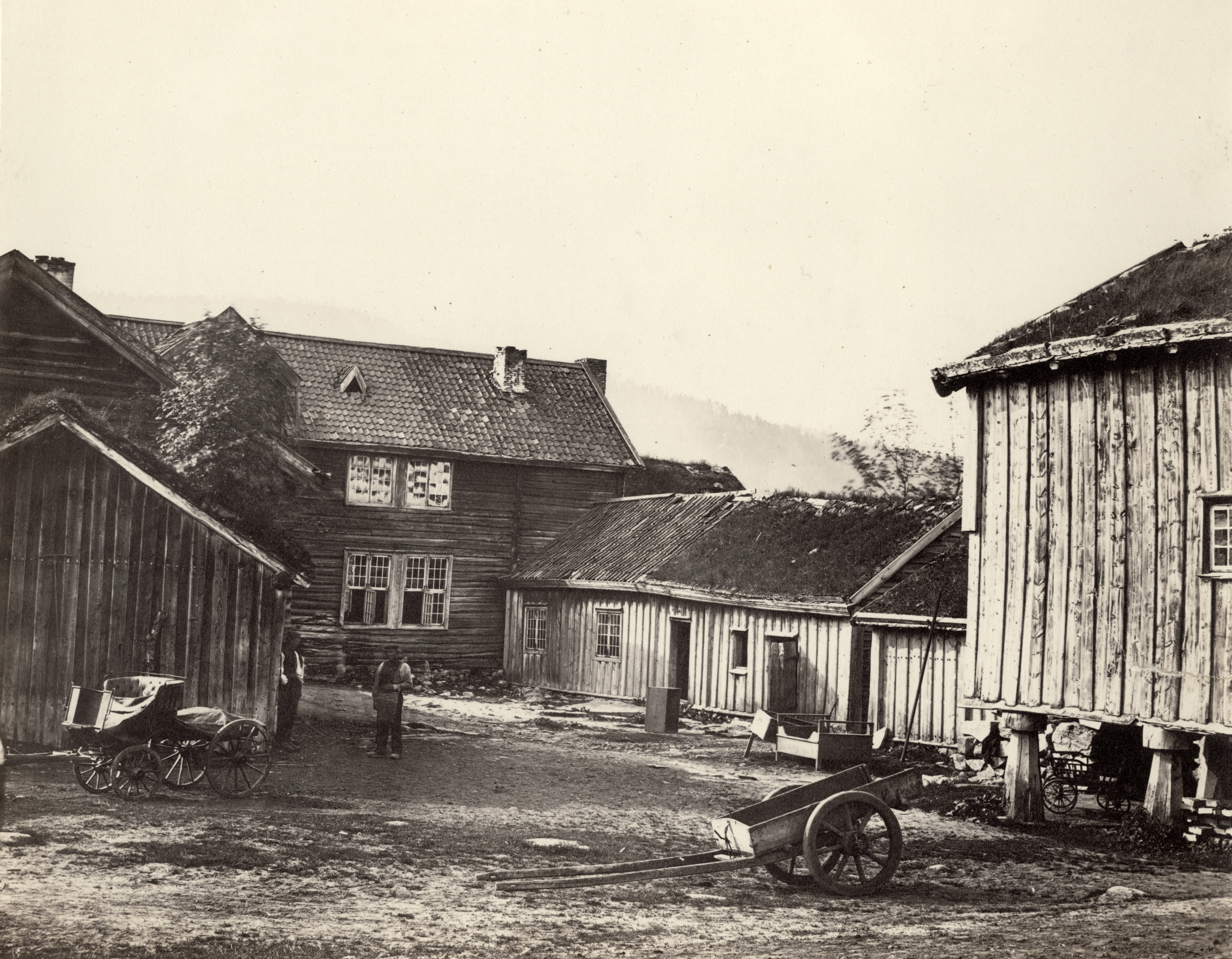 Vestnes poststasjon i Vestnes, Møre og Romsdal This image on crowdsourcing geotagging platform Fotodugnad